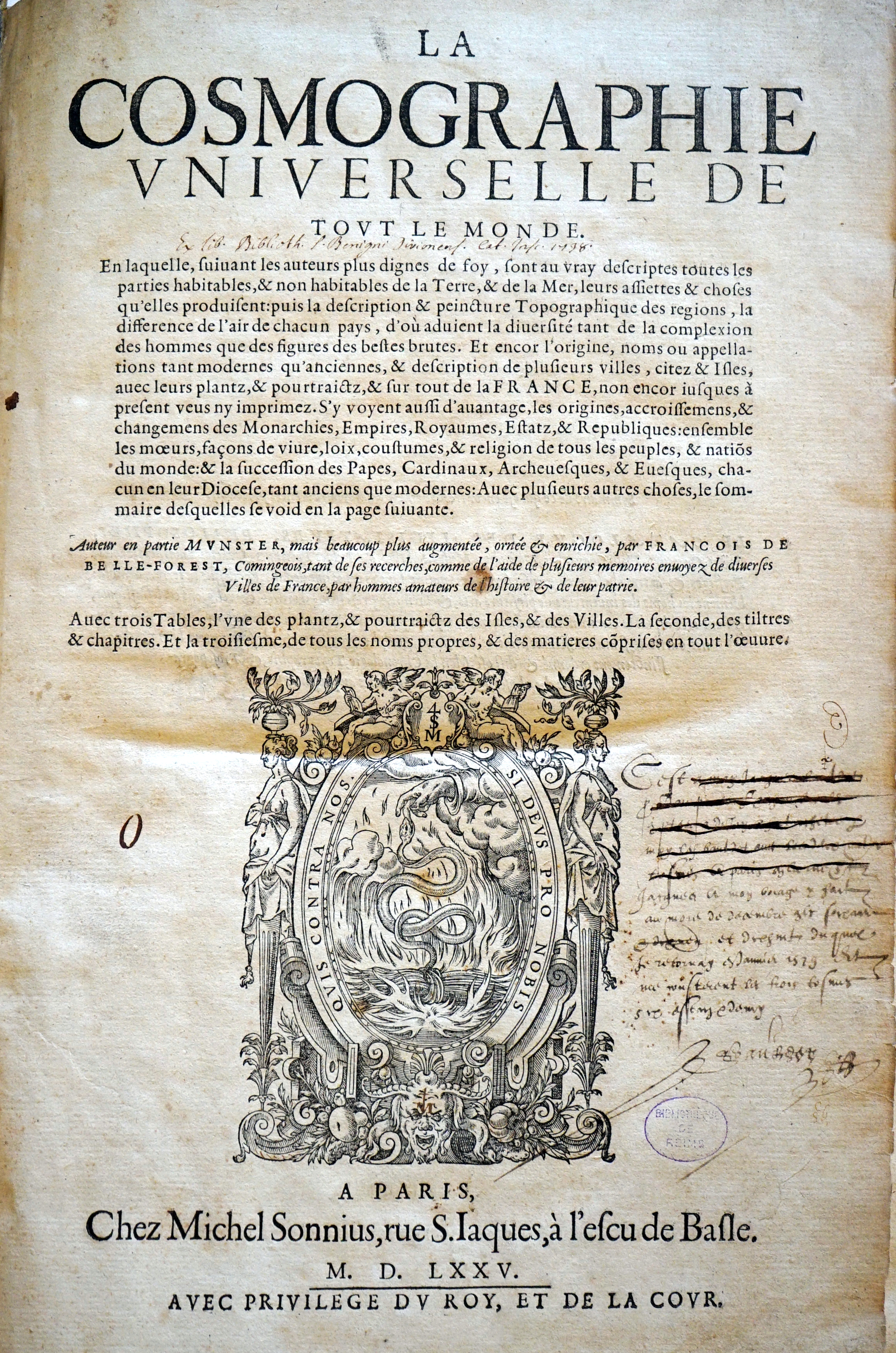 extrait du livre de F. de Belleforest.